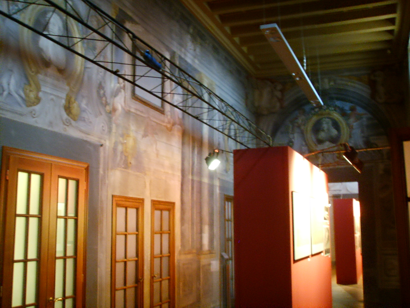 Palazzo vai, affreschi corridoio